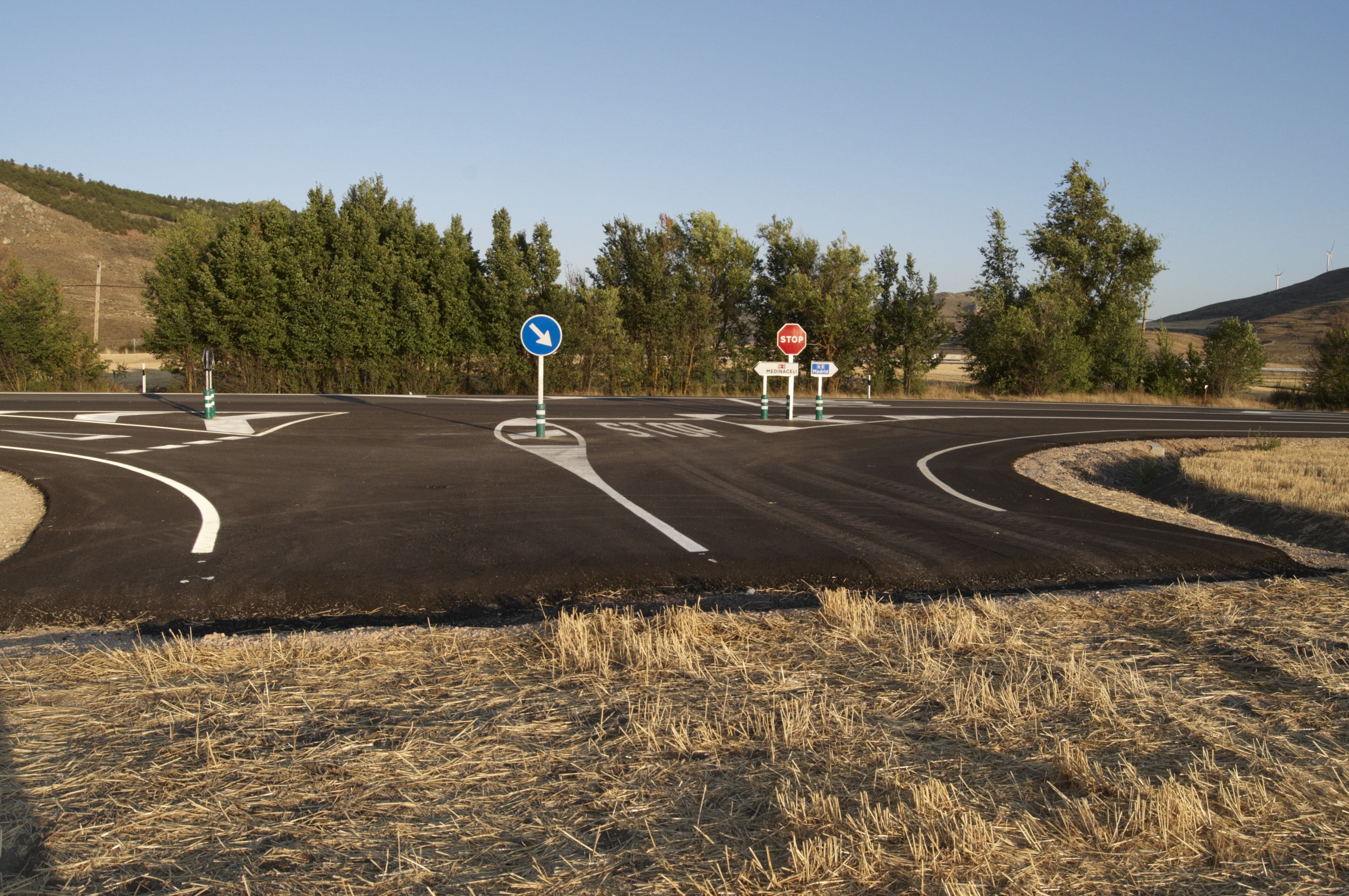 Fin de presupuesto